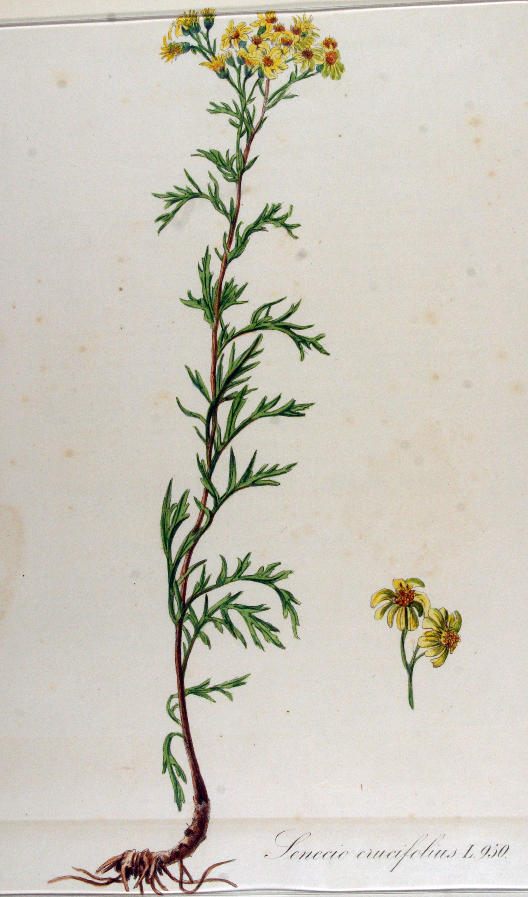 Jacobaea erucifolia (L.) P. Gaertn., B. Mey. & Scherb. (Syn. Senecio erucifolius L.)